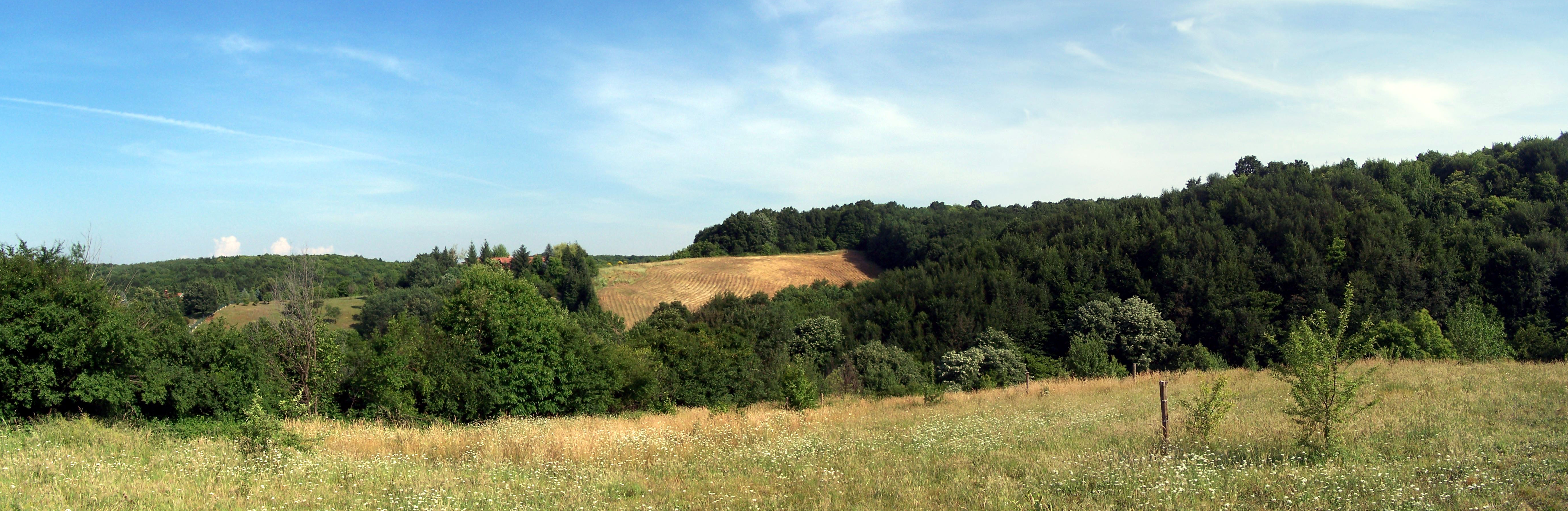 Nature in Polonezköy